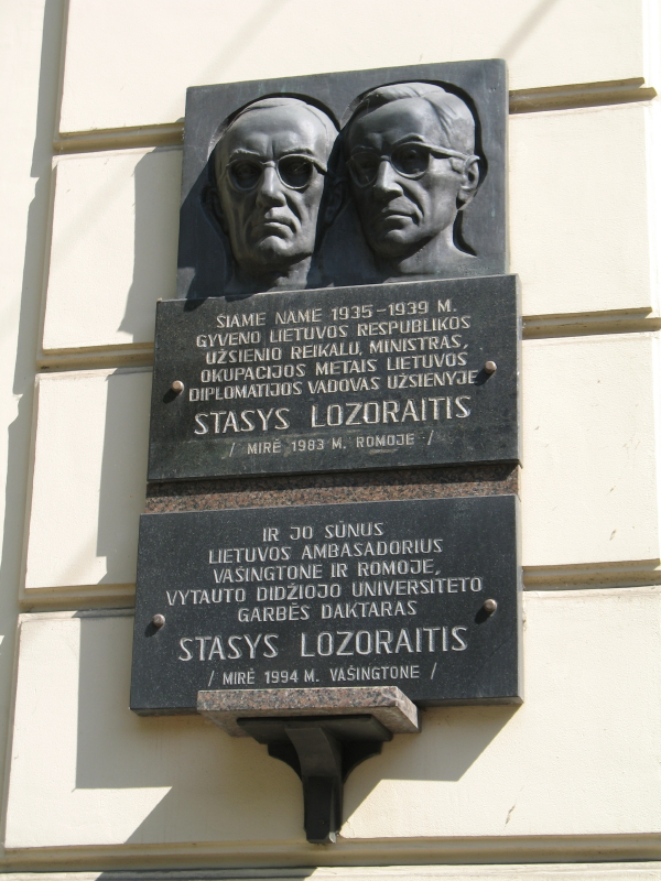 Paminklinė lenta Lozoraičiams Kaune.